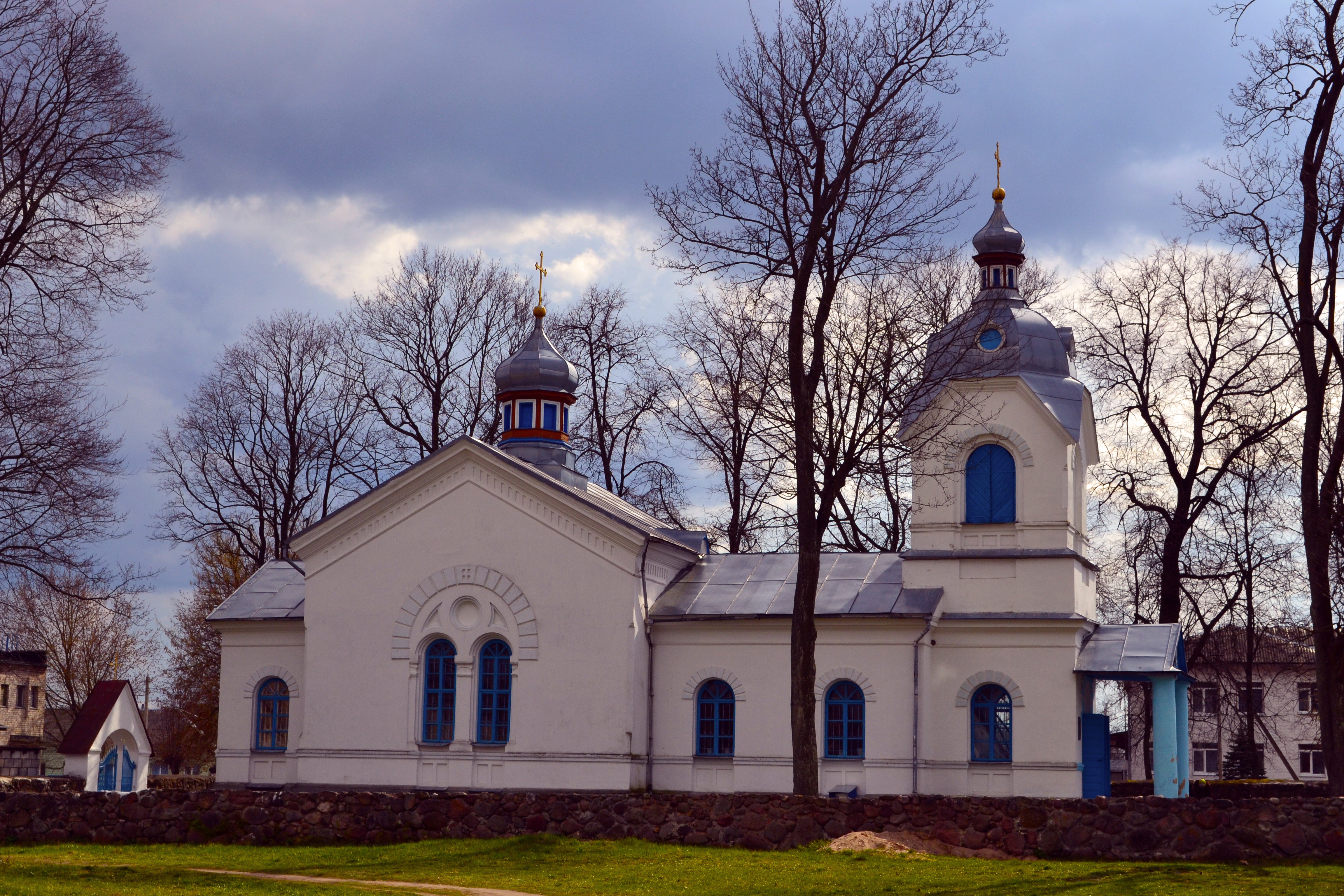 Беларуская (тарашкевіца): Сьвята-Антоніеўская царква ў Косаве. This is a photo of Belarusian heritage monument. Reference number: 113Г000307 ( WLM)